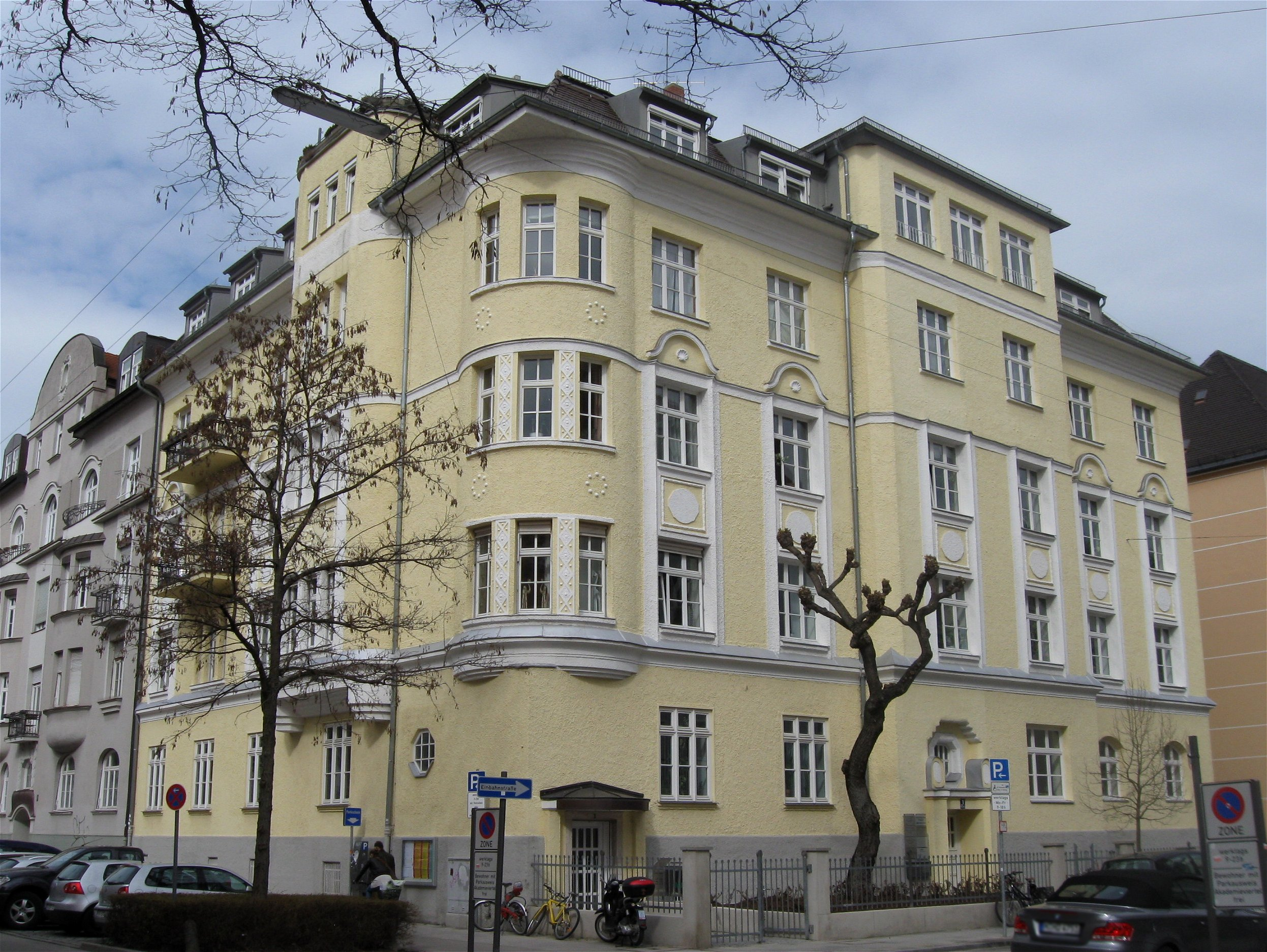 Hohenstaufenstraße 1. Mietshaus, viergeschossiger putzgegliederter Jugendstil-Eckbau mit Mansardwalmdach, Eingangsrisalit, Erkern, Balkons und Stuckdekor, Anfang 20. Jh.